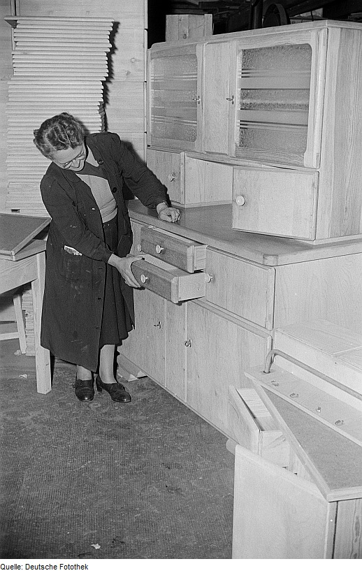 Original image description from the Deutsche Fotothek Eine Mitarbeiterin begutachtet die Schubladen einer Küchenanrichte des SAG Bleichert